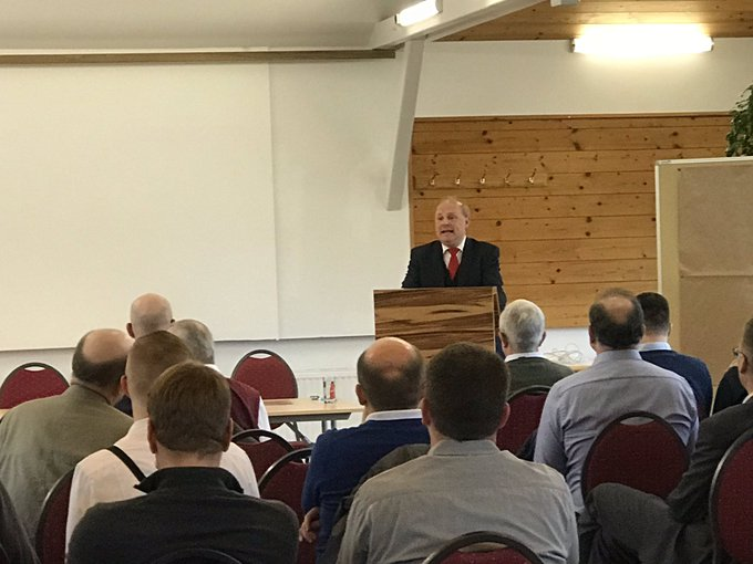 Vortrag zum Thema "Der Volksbegriff im Wandel der abendländischen Tradition" in Semriach b. Graz am 24.11.2019 auf Einladung des Freiheitlichen Akademikerverbandes und des Instituts für Staatspolitik